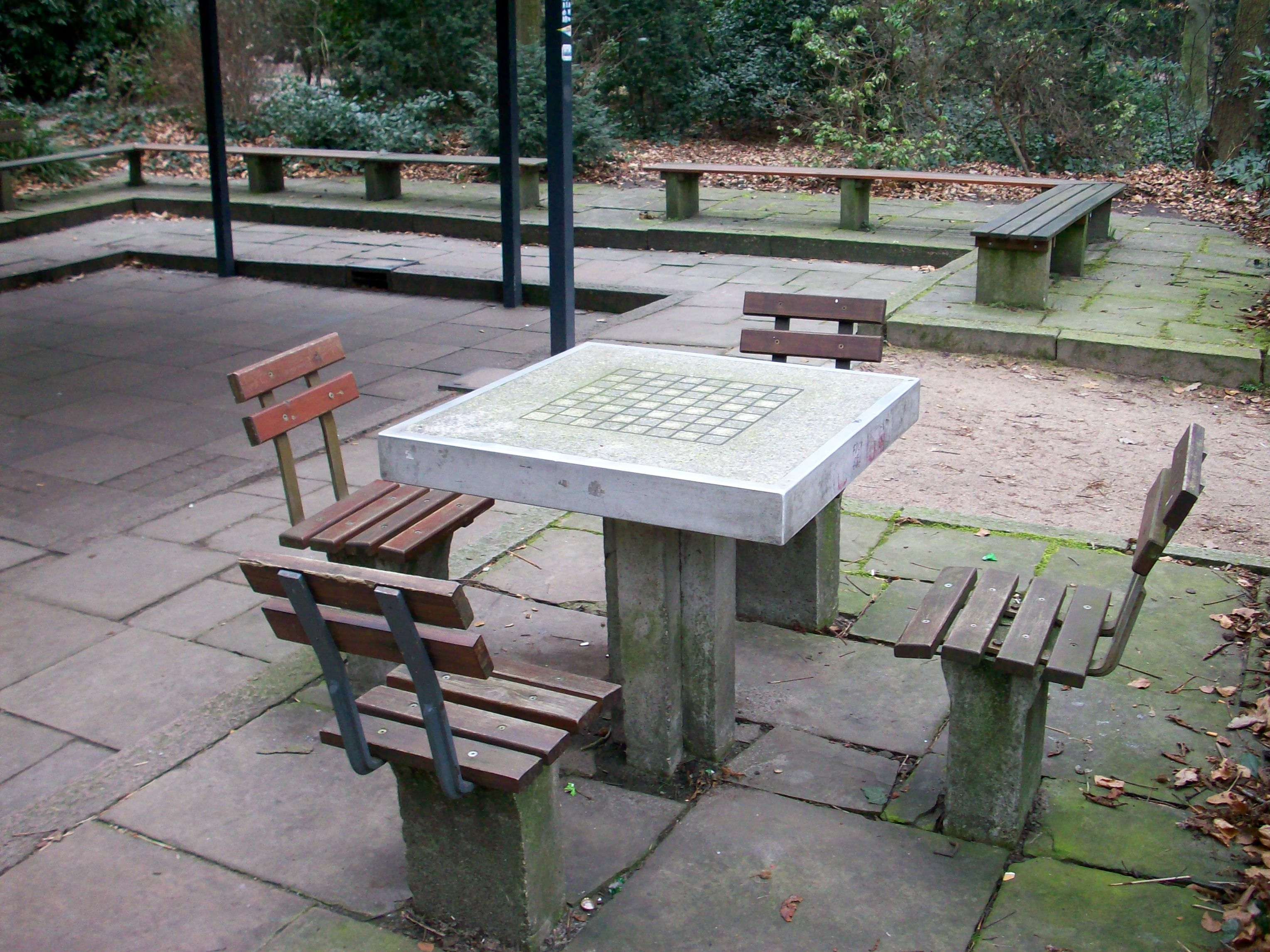 Schachanlage im Hammer Park, Hamburg-Hamm.